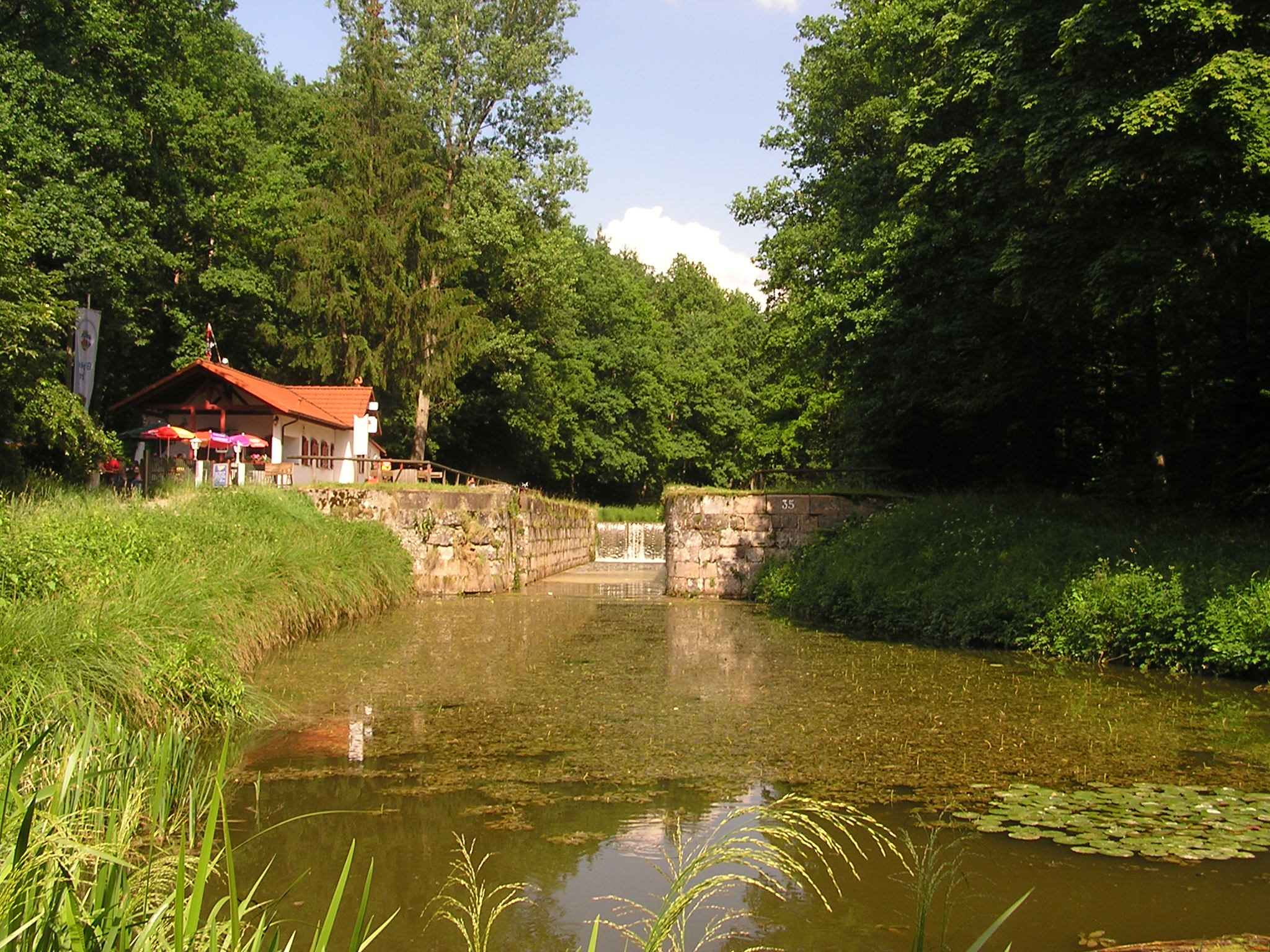 Schleuse 35 des Ludwig-Donau-Main-Kanal